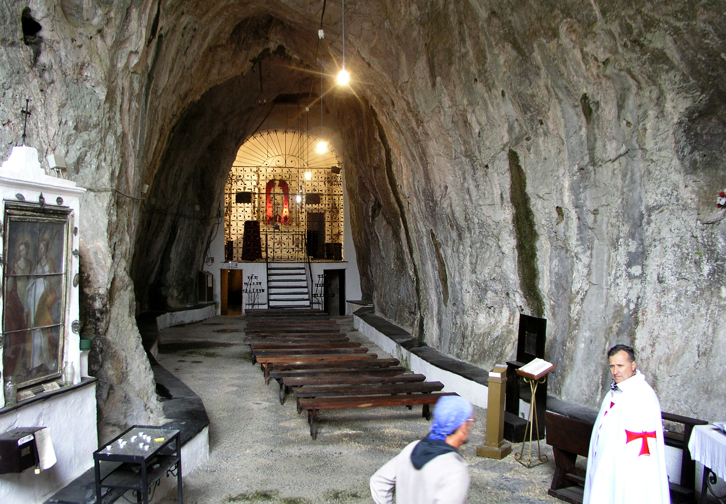 Grotte-sanctuaire de Santa Lucia, Toirano, Ligurie, Italie.